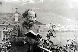 Élisée Reclus, né à Sainte-Foy-la-Grande (Gironde) le 15 mars 1830 et mort à Torhout en Belgique le 4 juillet 1905, est un géographe libertaire.